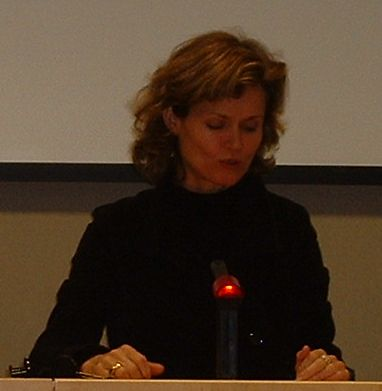 Deutsche MdEP Helga Trüpel in Brüssel, 1. Dezember 2004.